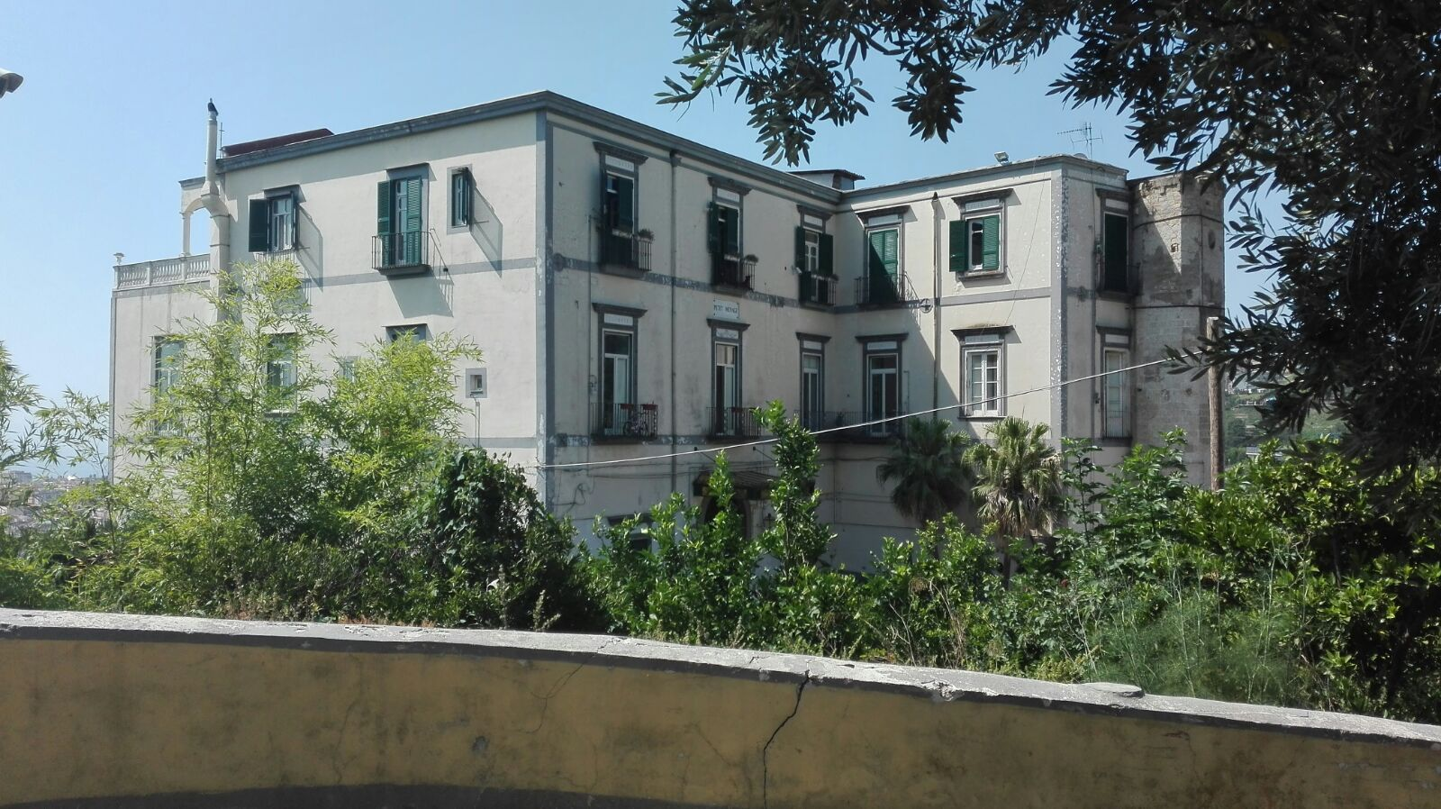 Villa Serra, nota anche come villa Bloch, ai Colli Aminei.